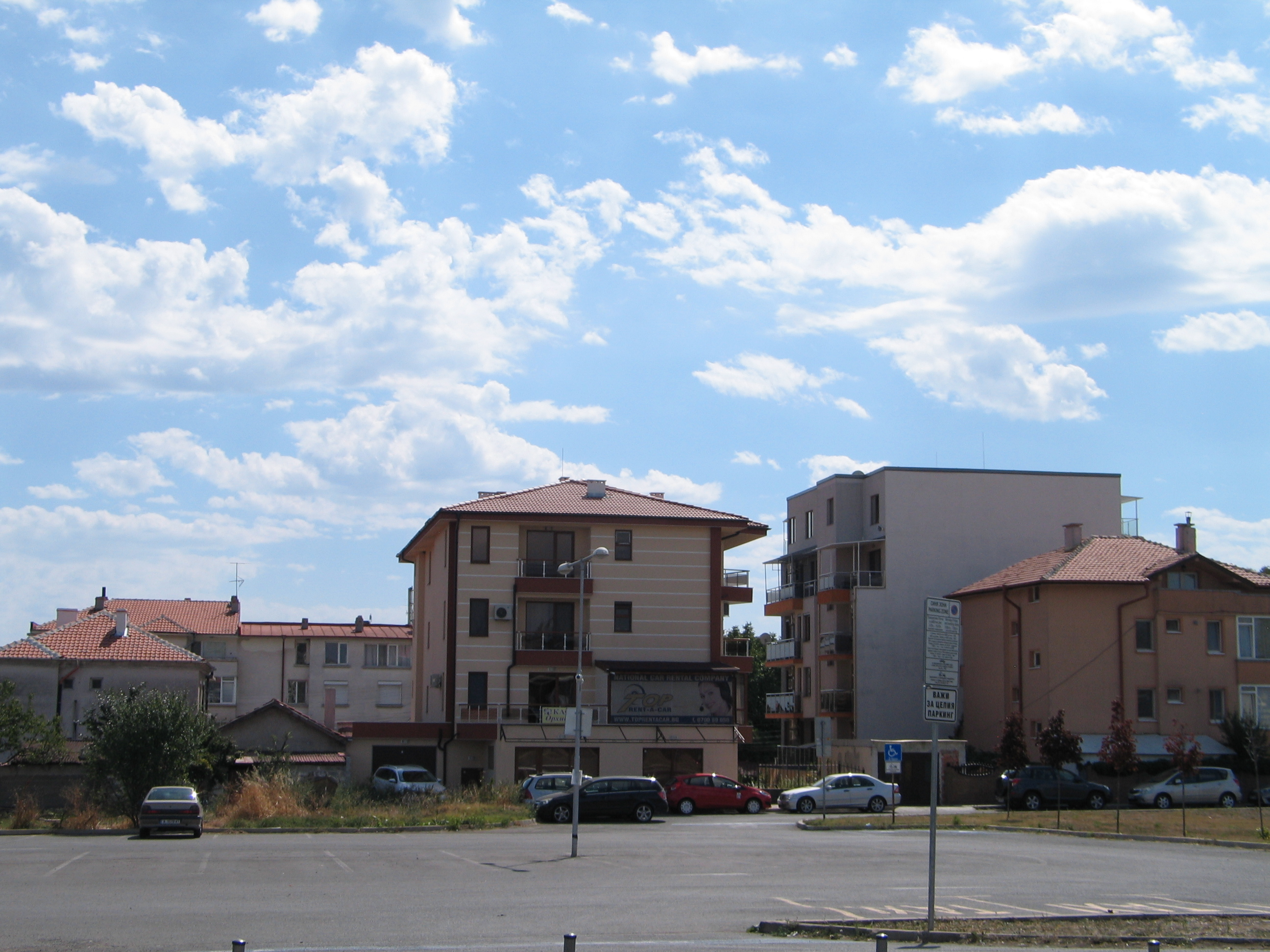 Бургас, квартал Сарафово